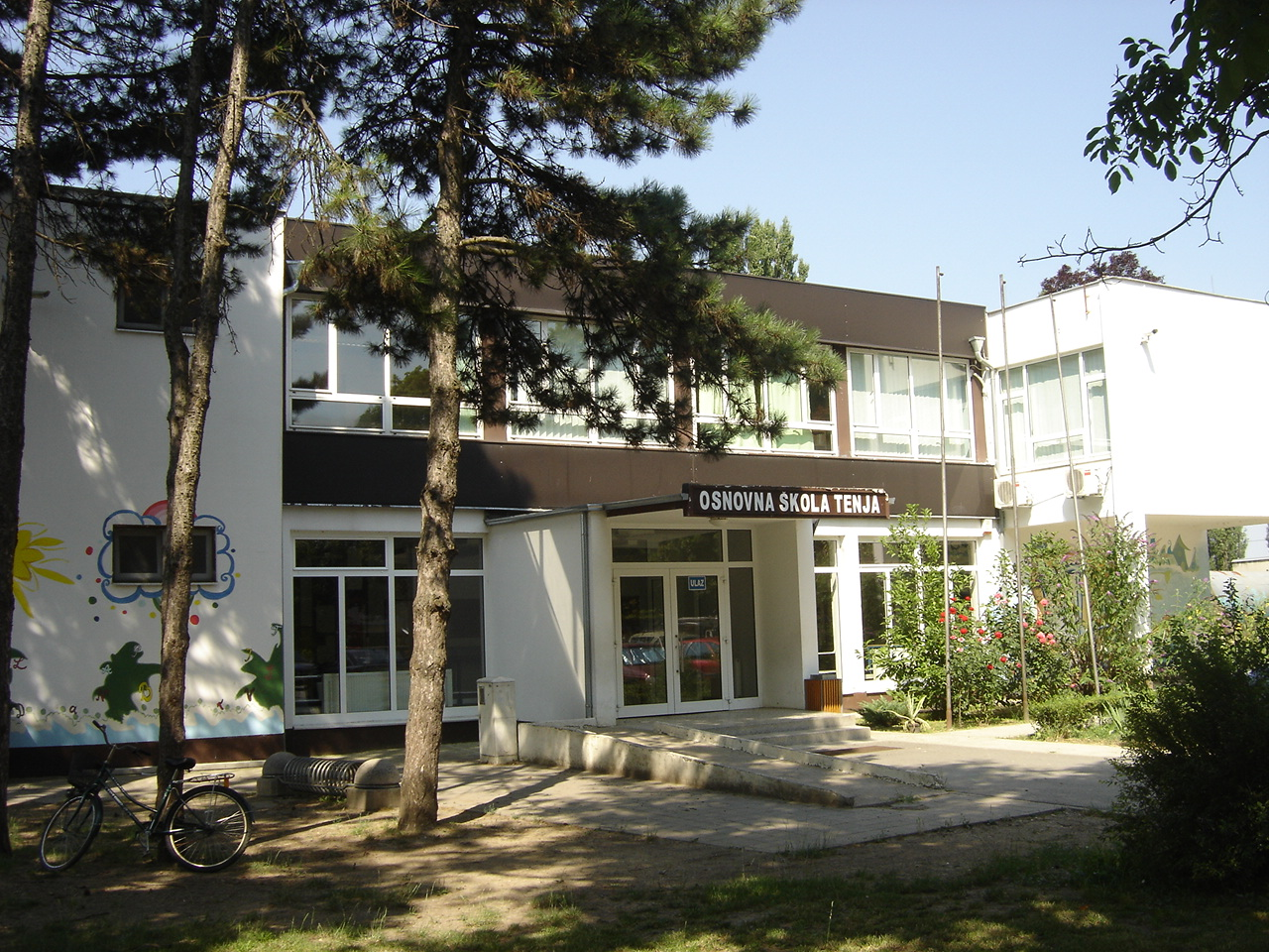 Osnovna škola Tenja